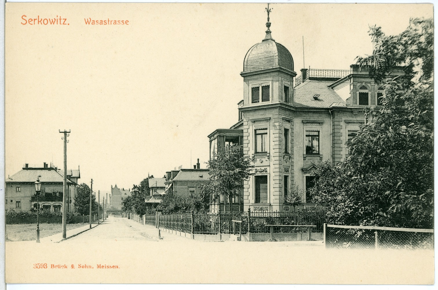 Serkowitz; Wasastraße This postcard is from publisher Brück & Sohn in Meißen ( postcard has a unique number 03593 and is available in a higher resolution at the publisher. This images was uploaded in a cooperation project between Wikipedians and the publisher.